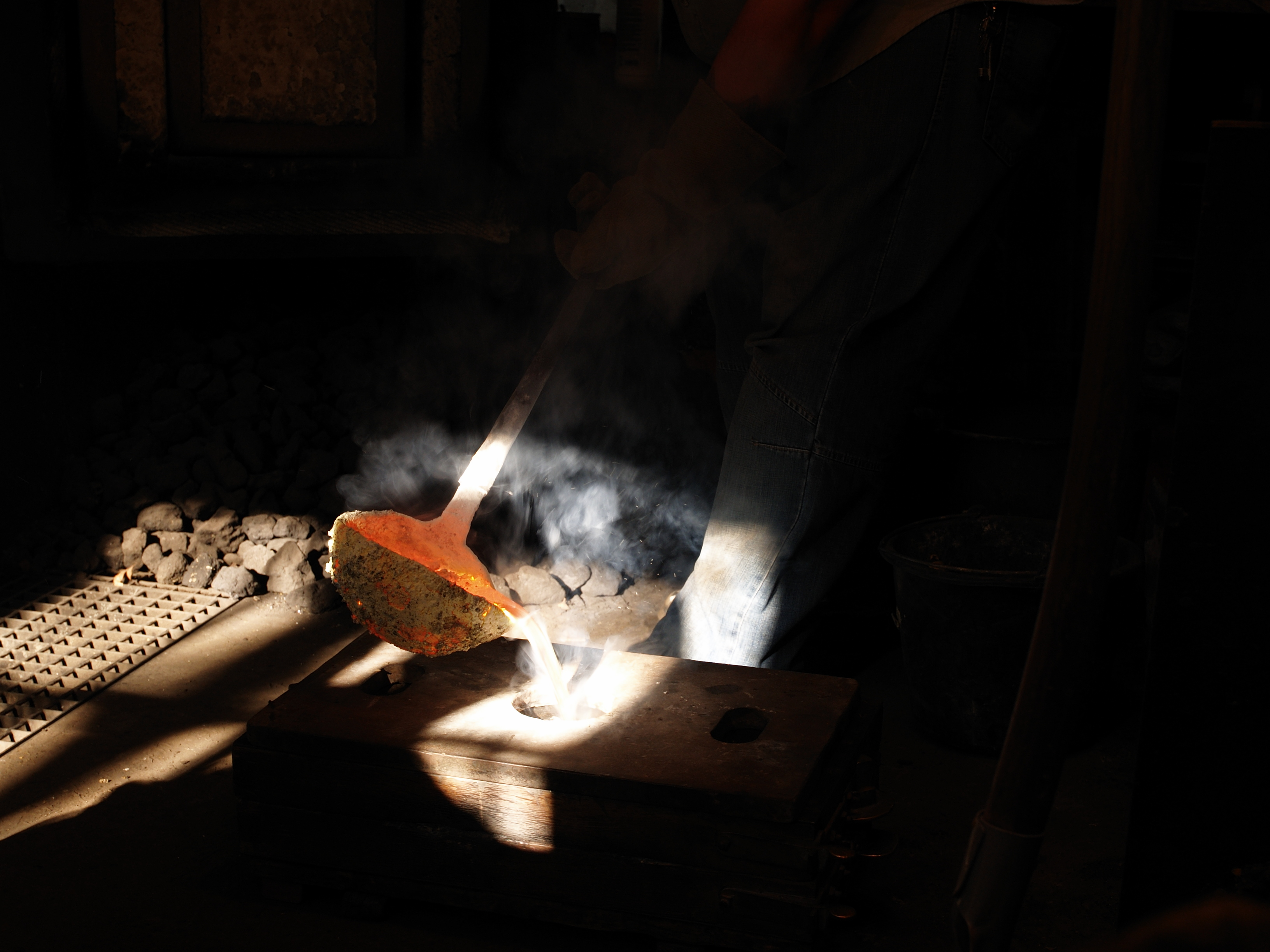 22. Wikipedia-Sauerlandstammtisch, Besuch in der Gelbgießerei des Museums in Iserlohn-Barendorf (Maste Barendorf), Gussvorgang, Flüssigmessing